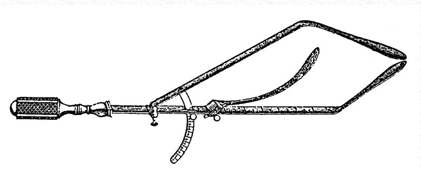 Intropelvimètre de Marie Boivin